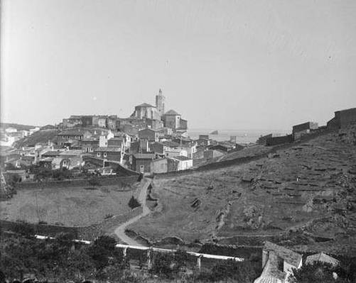 Imatge